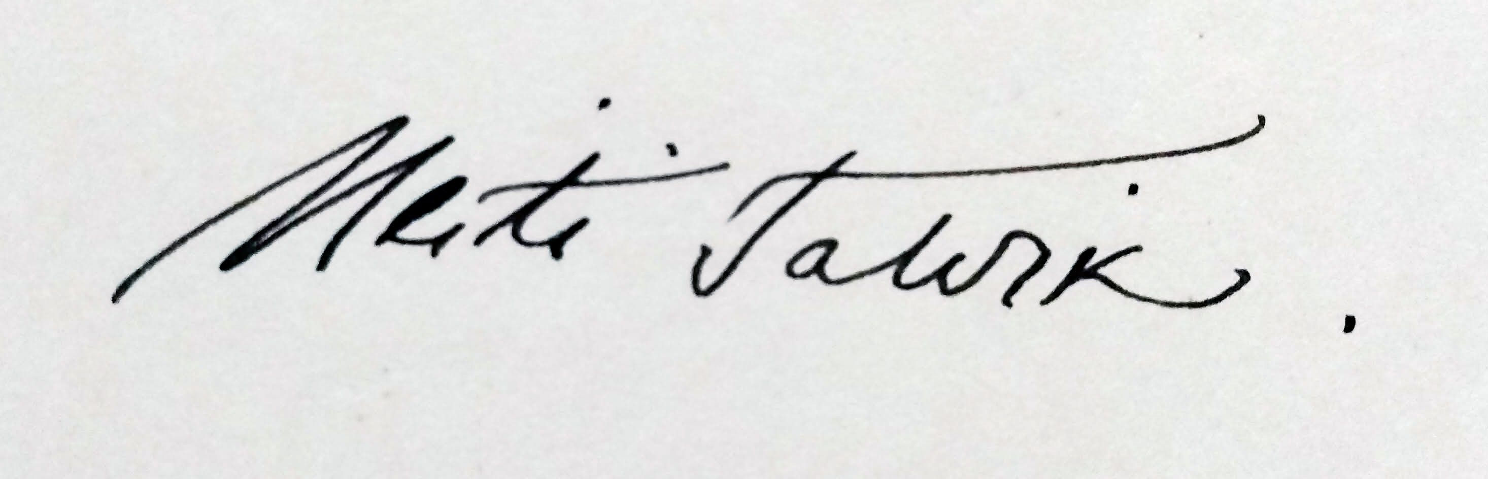 Heiti Talviku autogramm "Palaviku" signeeritud eksemplarist